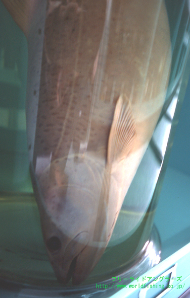 チョウコウイトウ( Hucho bleekeri)